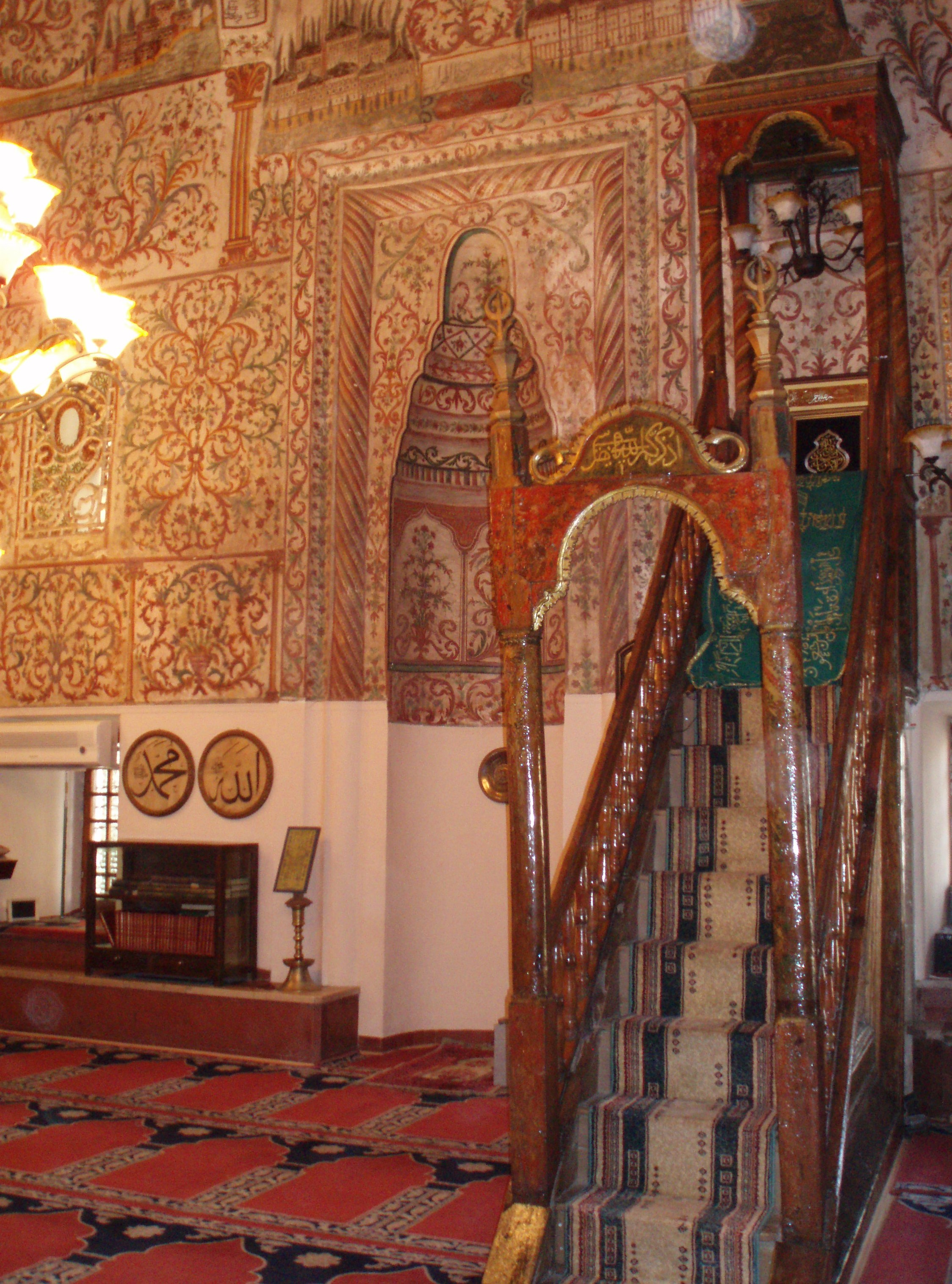 Tirana, Et'hem Bey Mosque.